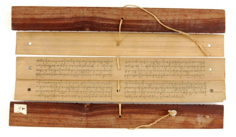 Handschrift. Geschrift op lontarblad